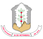 Brasão da cidade de São Gotardo/MG, Brasil.